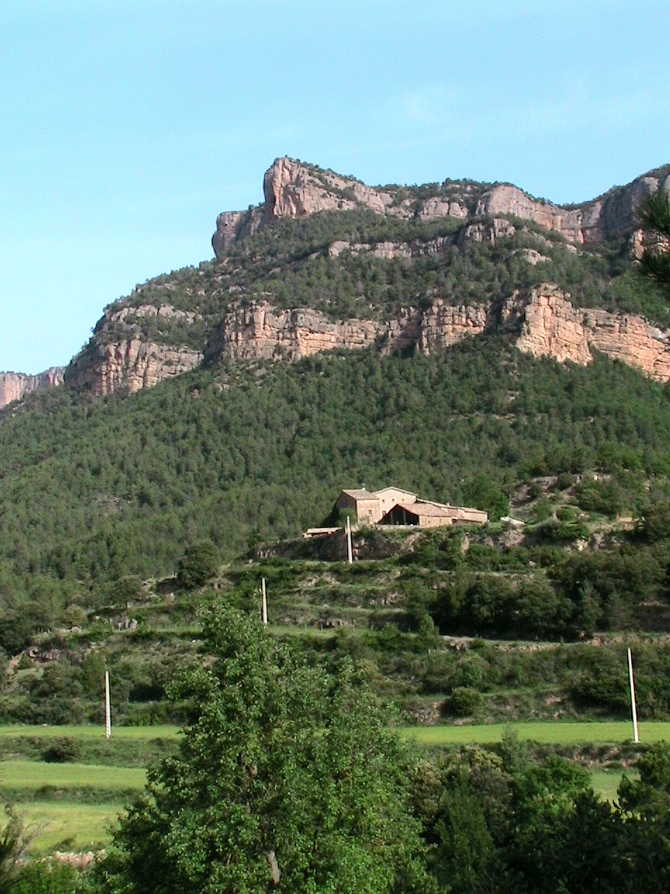 El Turó de l'Escala a dalt de tot del cingle de Busa, per sobre la masia del Pujol, des del fons de la Valldora. Navès (Solsonès - Catalunya)